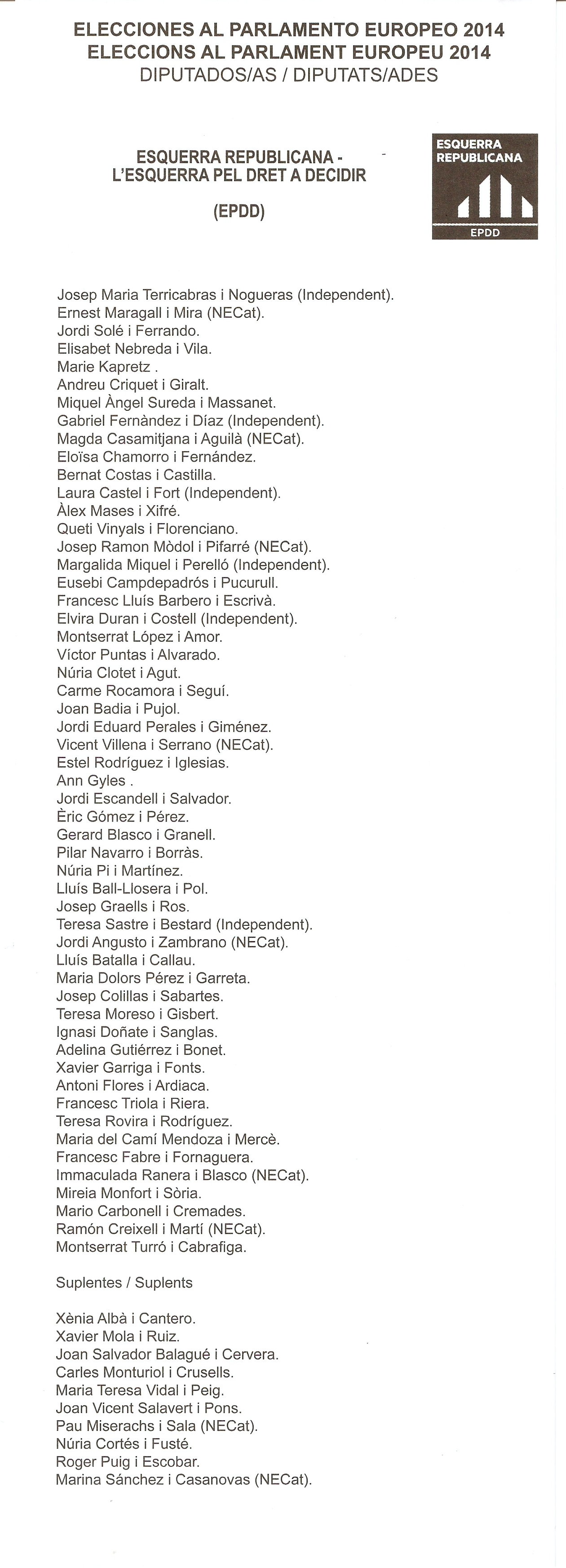 Papeleta de Esquerra Republicana - l'Esquerra pel Dret a Decidir para las elecciones europeas de 2014. Edición para la Comunidad Valenciana.